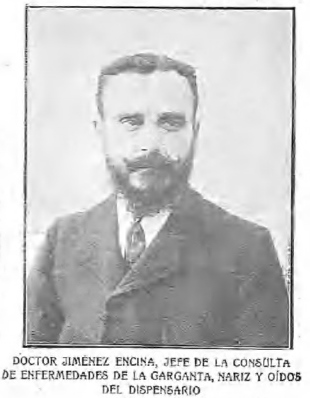 Cristobal Jimenez Encina 1904